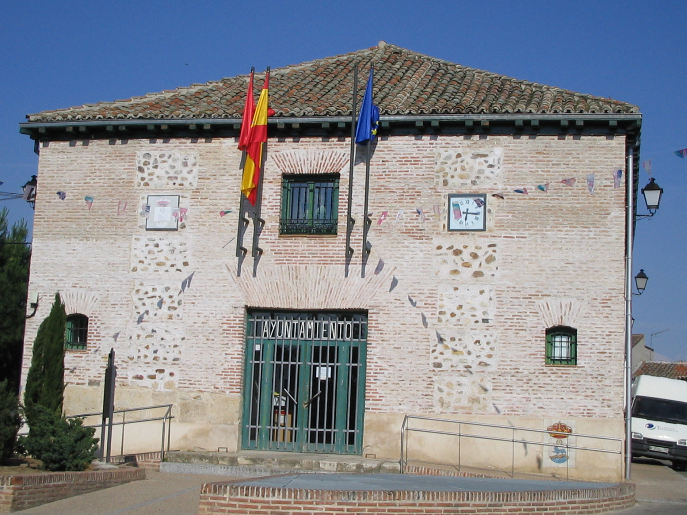 Ayuntamiento de Talamanca del Jarama.